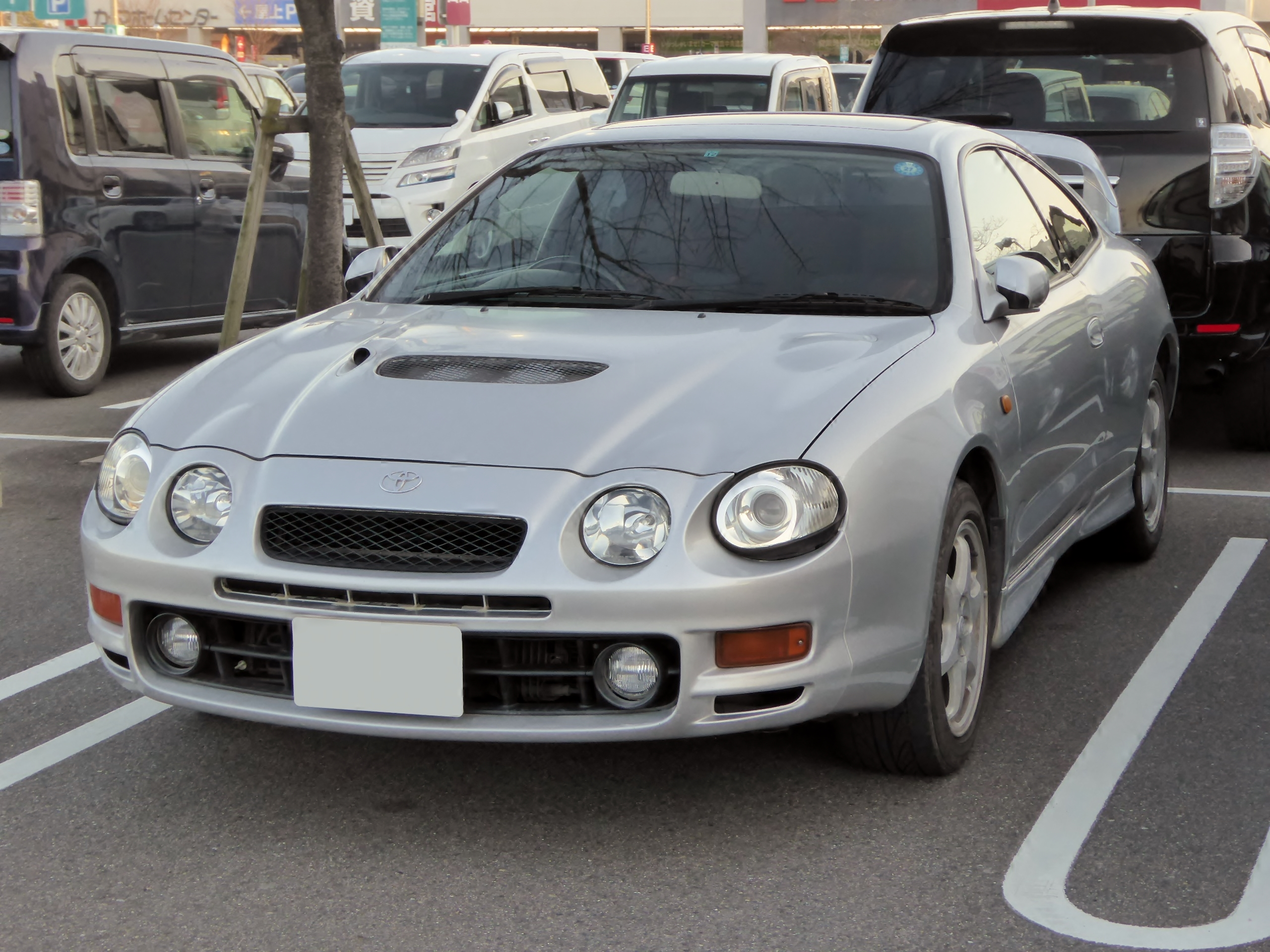 ST205型トヨタ・セリカ2.0GT-FOURをフロントから撮影。